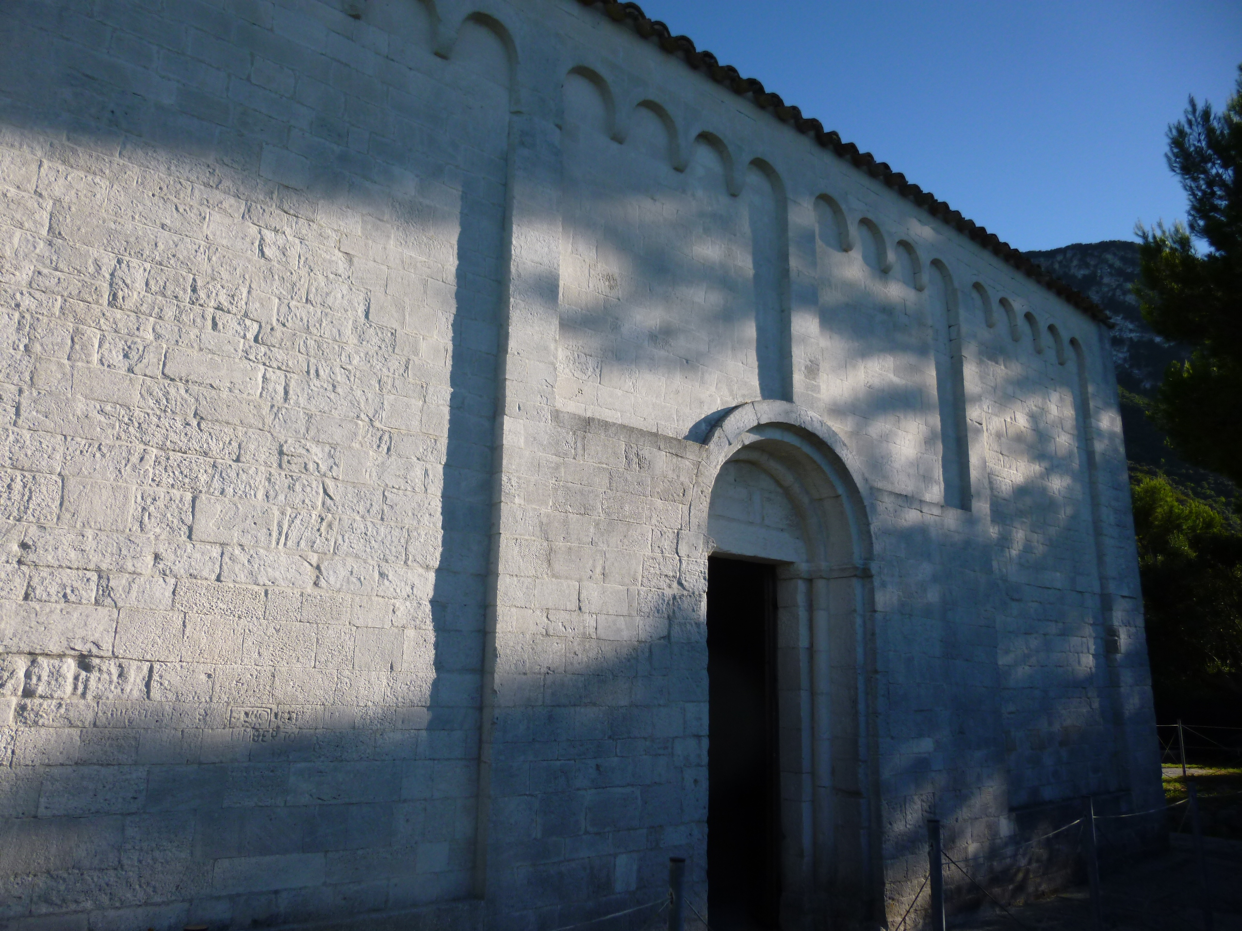 Chiesa di Santa Maria di Portonovo This is a photo of a monument which is part of cultural heritage of Italy.